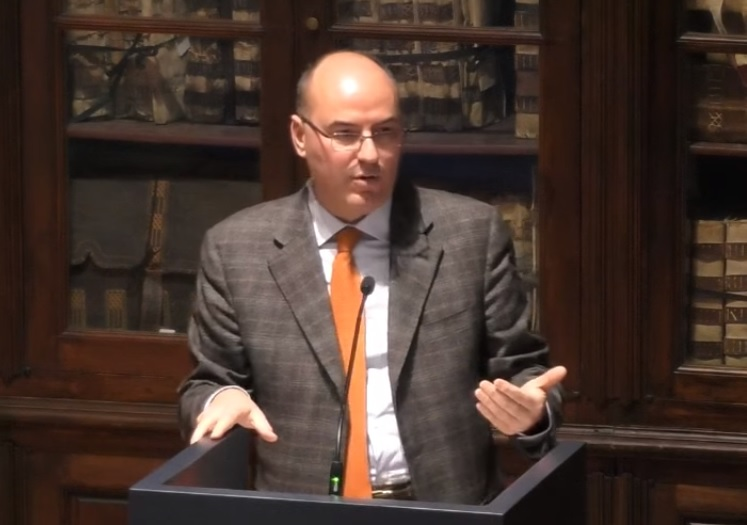 STORIOGRAFIA E IMPEGNO CIVILE Un incontro di studi su Roberto Vivarelli Intervengono Paola Carlucci, Università per Stranieri di Siena Loreto Di Nucci, Università degli Studi di Perugia Daniele Menozzi, Scuola Normale Superiore Mauro Moretti, Università per Stranieri di Siena Giovanni Orsina, LUISS Guido Carli, Roma Ilaria Pavan, Scuola Normale Superiore Roberto Pertici, Università degli Studi di Bergamo Giovanni Sabbatucci, Sapienza Università di Roma Teodoro Tagliaferri, Università degli Studi di Napoli Federico II 2 Dicembre 2015